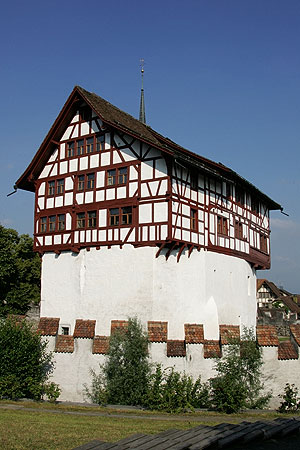 Zug: Burg und Museum